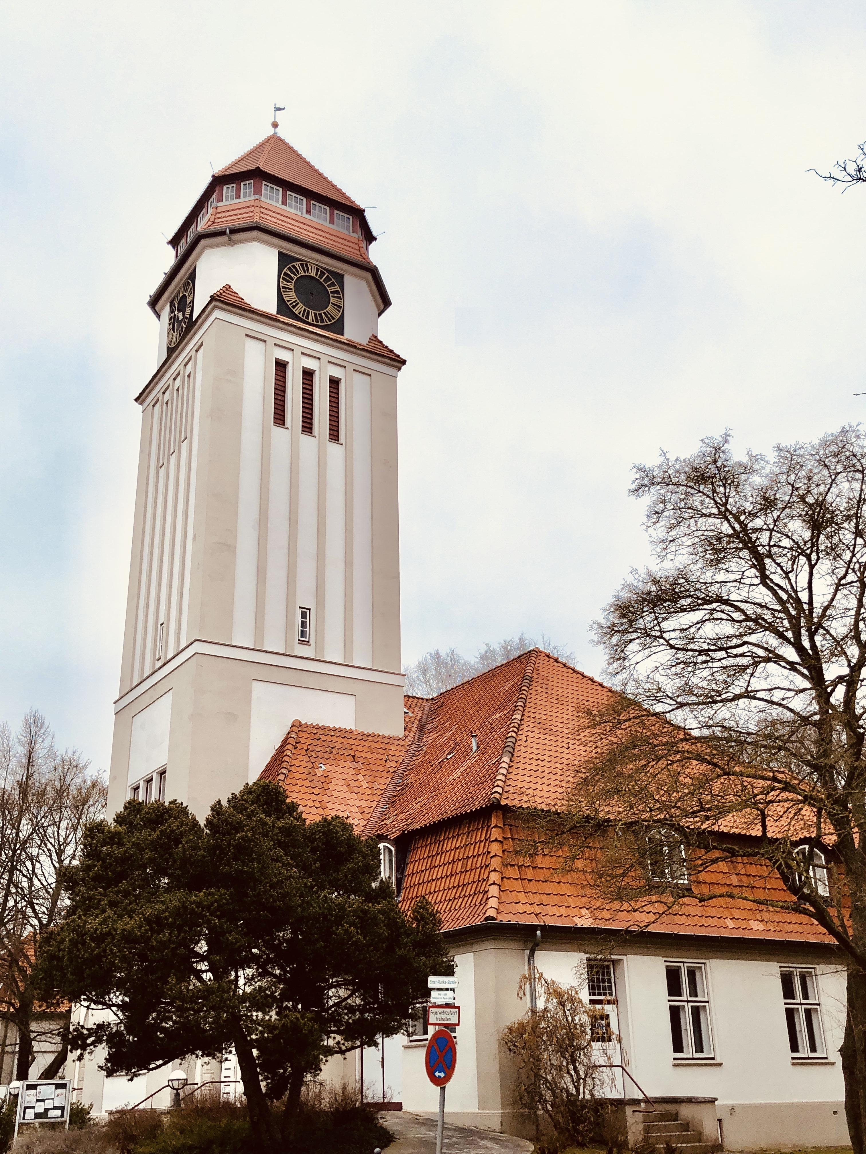 Turmgebäude (Wahrzeichen) der Universität der LübeckThis is a photograph of an architectural monument.It is on the list of cultural monuments of Lübeck